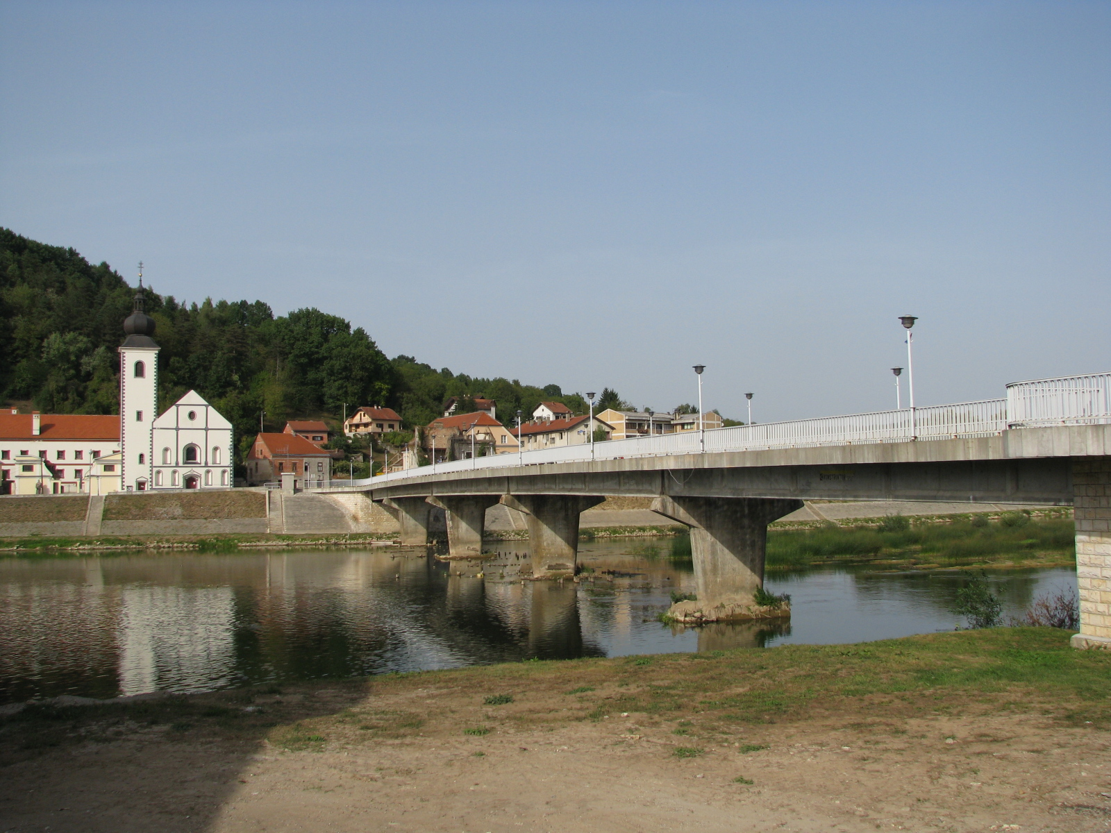 Most preko Une, Hrvatska Kostajnica